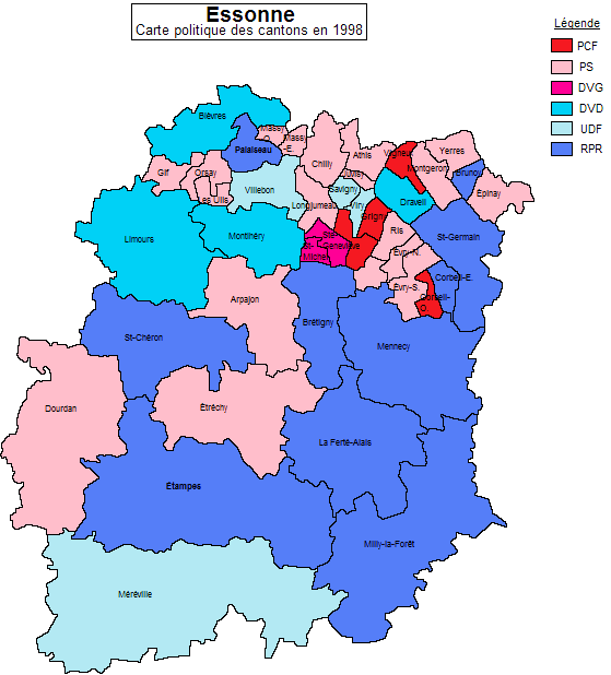 Carte politique des cantons de l'Essonne en 1998.